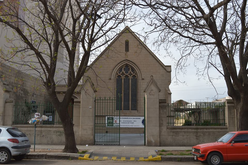 Edificio de la Iglesia Evangélica Valdense